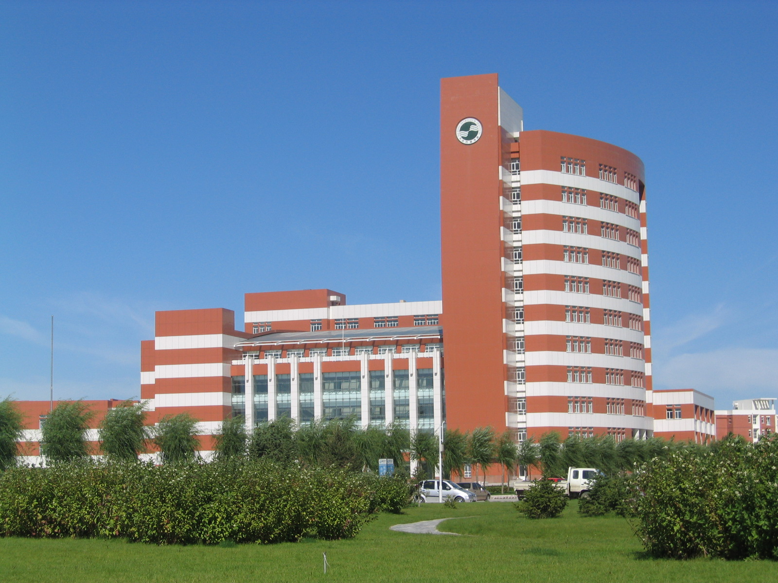 大庆石油学院图书馆